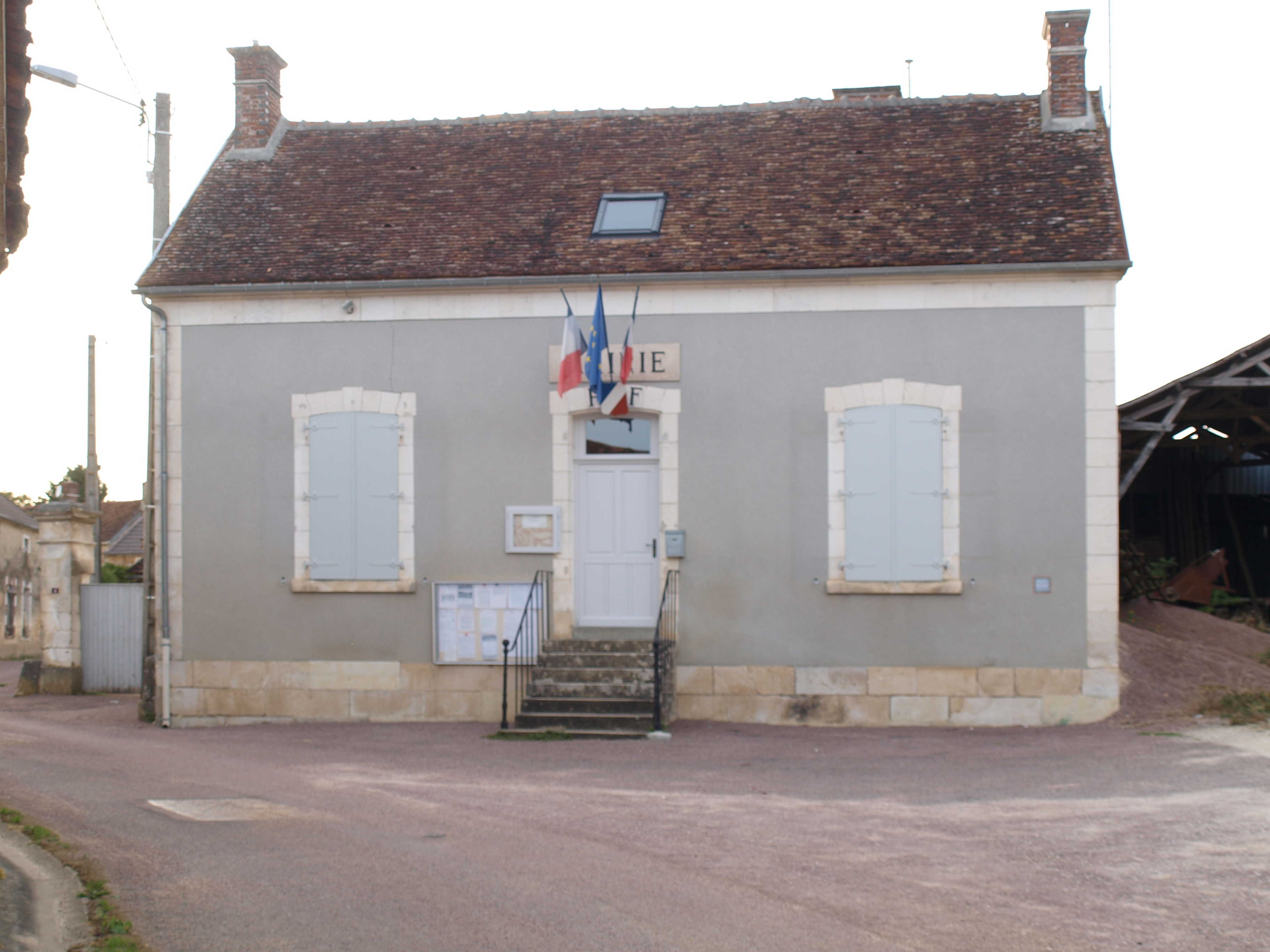 Lain (Yonne, France) ; mairie.